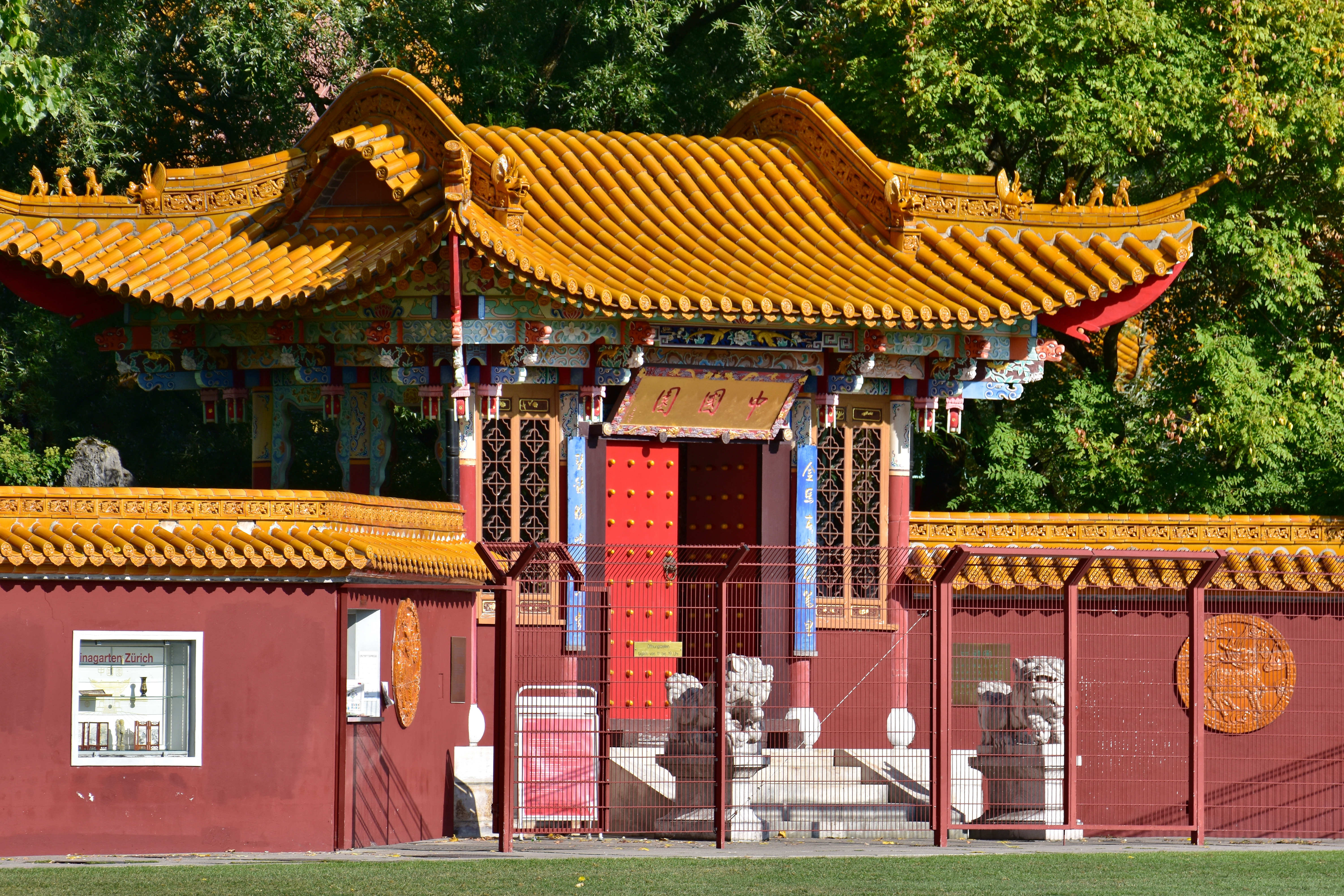 Chinagarten in Zürich-Seefeld (Switzerland)